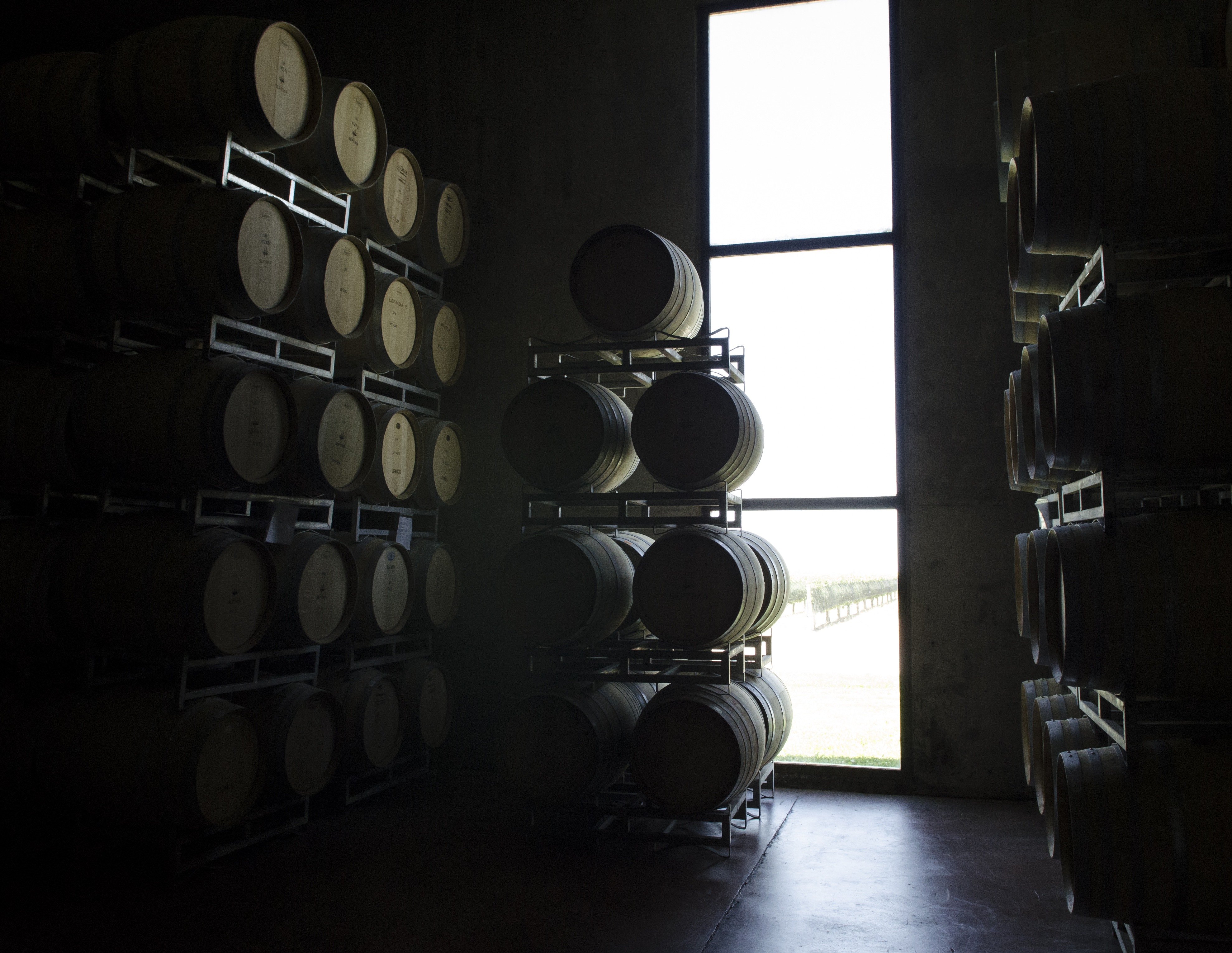 Almacenaje de vinos en toneles de roble. Mendoza, Argentina